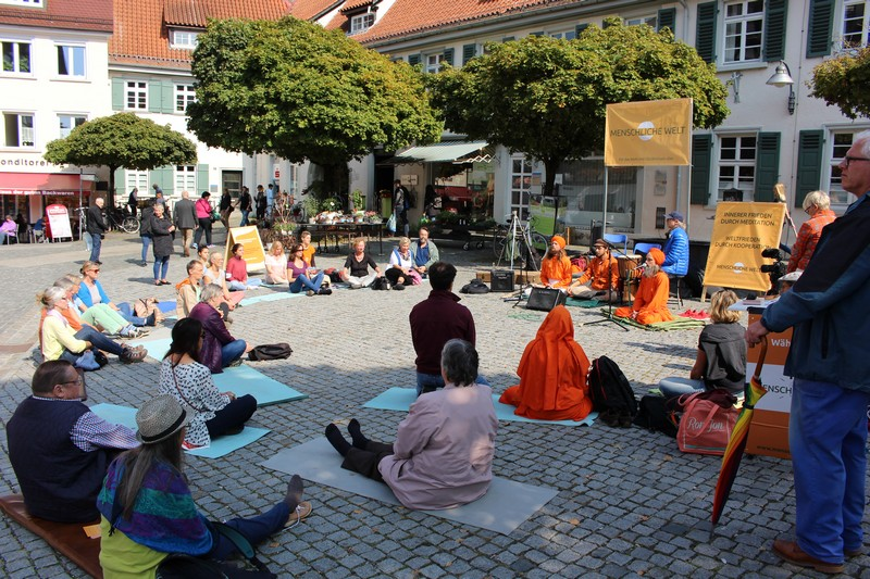 Menschliche Welt Friedensmeditation während einer Bundestagswahlversammlung in Ravensburg 2017